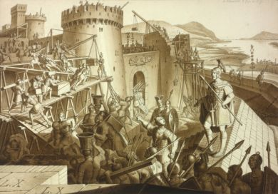 Die Römer errichten das Kastell Vindobona: Feder- und Pinselzeichnung in Braun, laviert, mit Weißhöhungen über Bleistift von Karl Ruß. Blatt 7 aus dem Zyklus „Bilder zur Geschichte von Wien“.